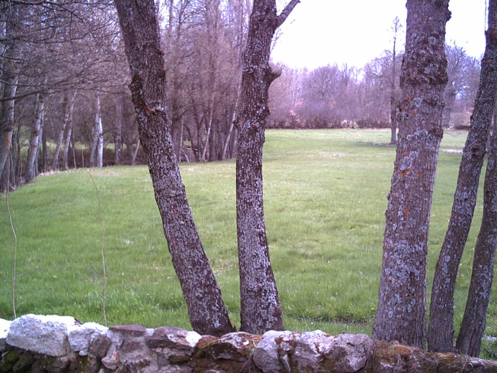 Prado cerca de Santa Colomba de Sanabria (Zamora, España). Tomada 2006-04-22.